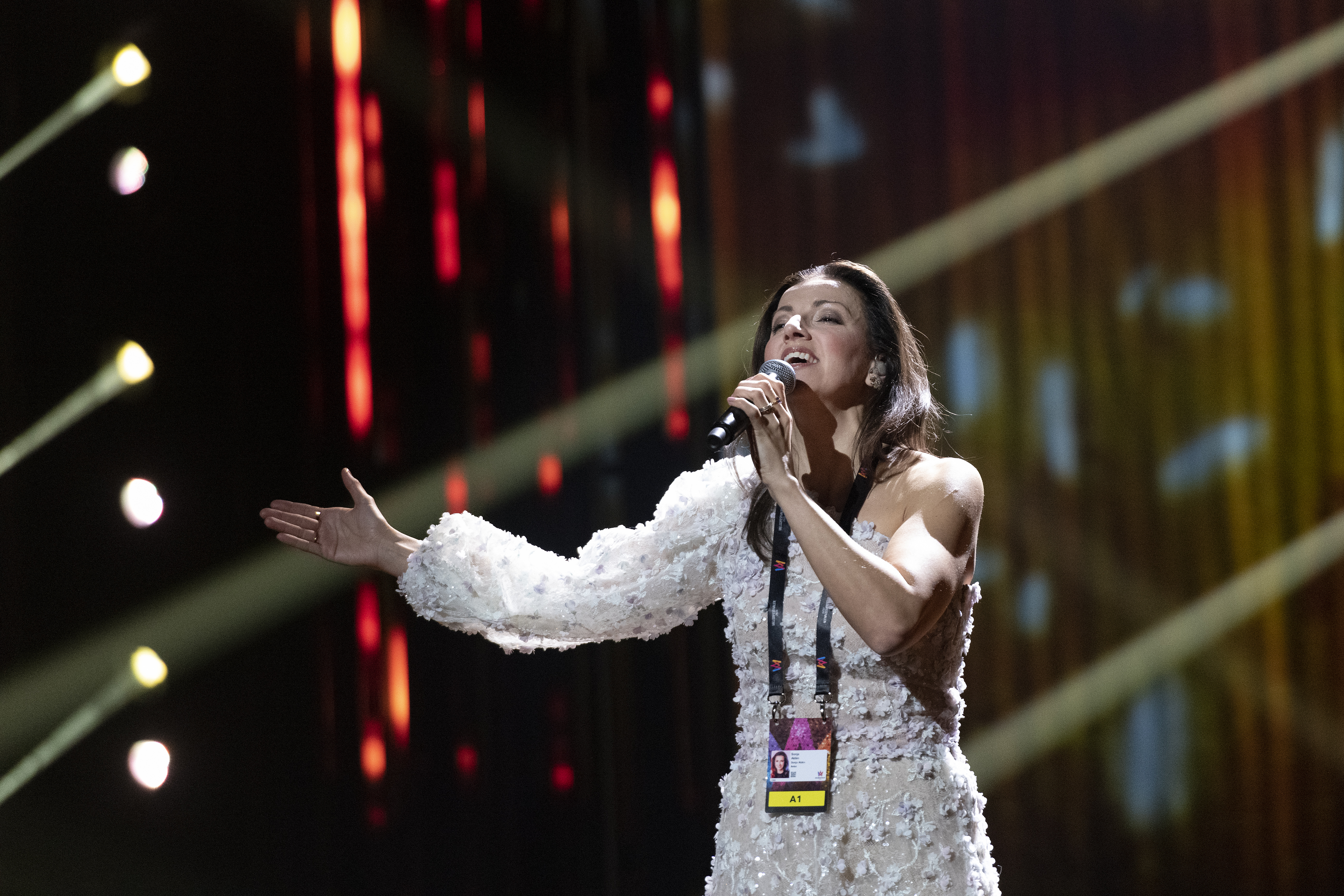 Sonja Aldén Melodifestivalen 2020 repetition